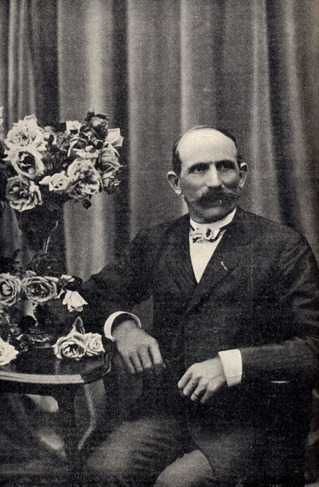 Джозеф Перне-Дюше